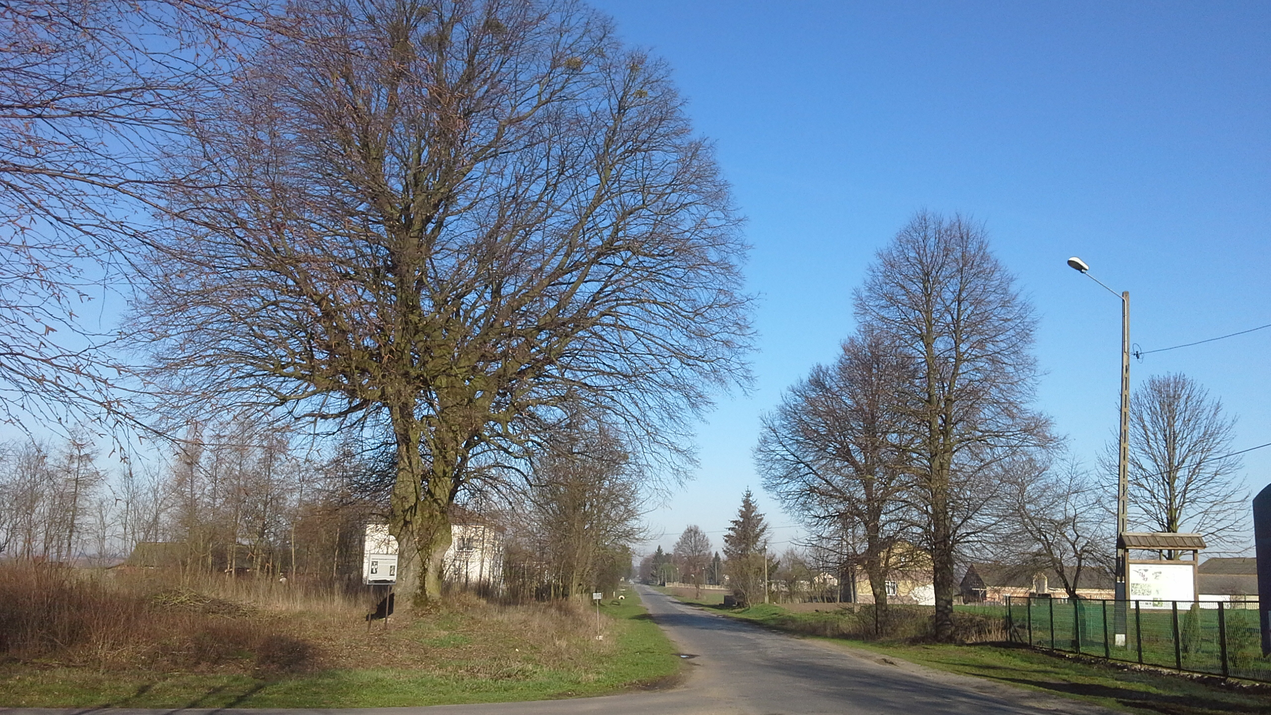 Droga Hrubieszów-Dołhobyczów w Czumowie. Po lewej prawdopodobne miejsce, gdzie znajdowała się cerkiew prawosławna zburzona w 1938